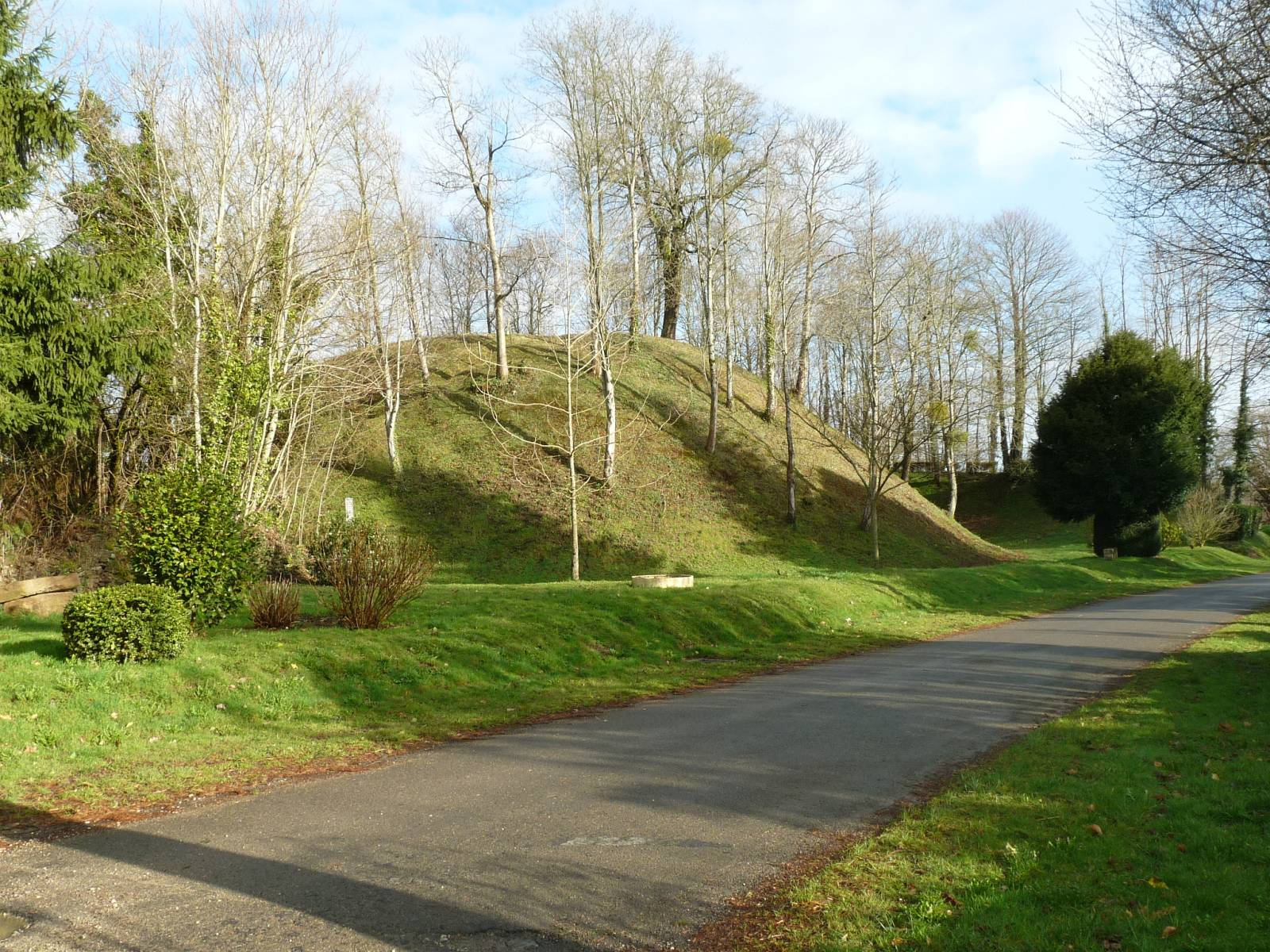 motte castrale derrière l'église de Mazerolles, Charente, France